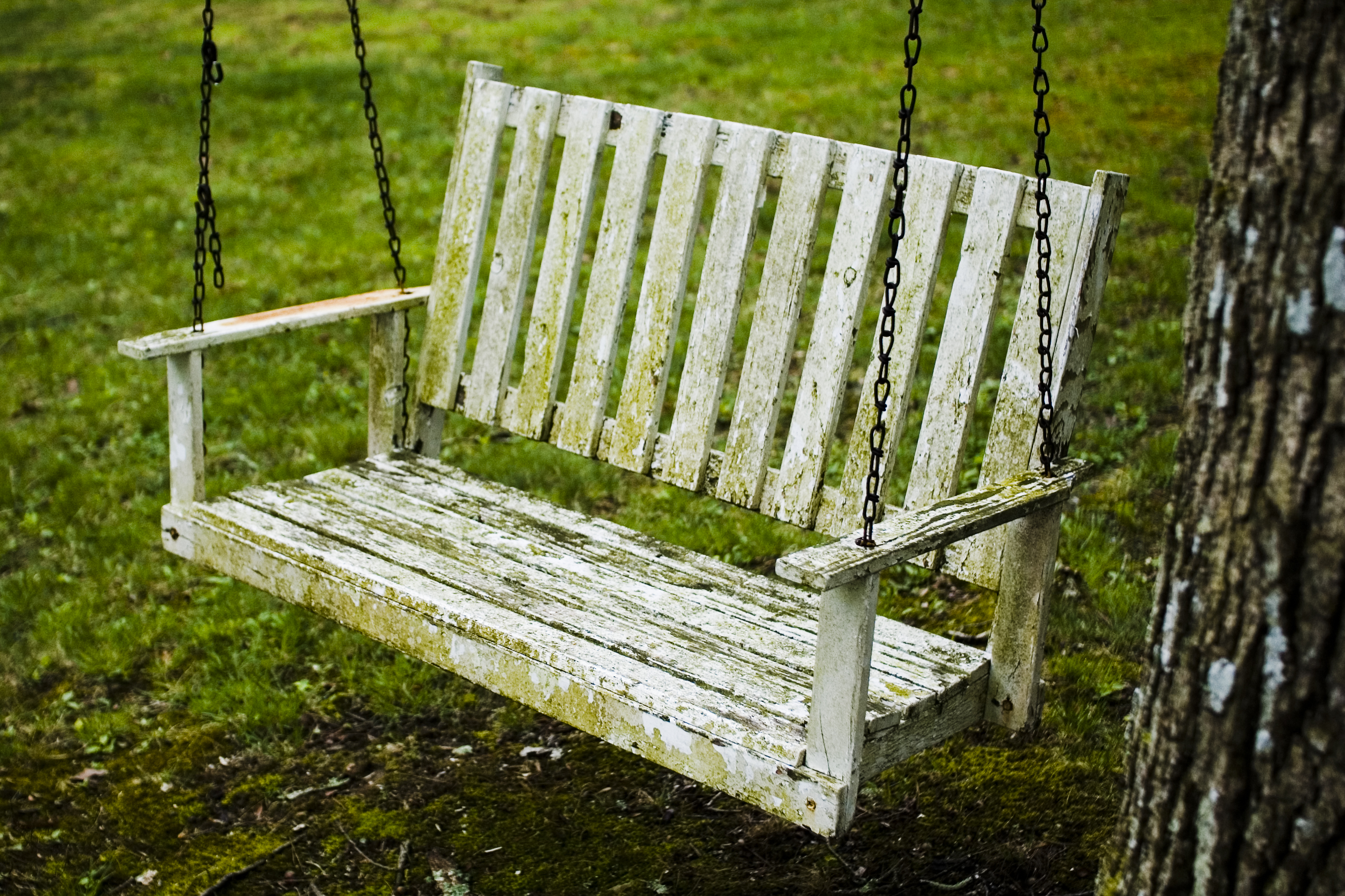 A mossy yard swing.